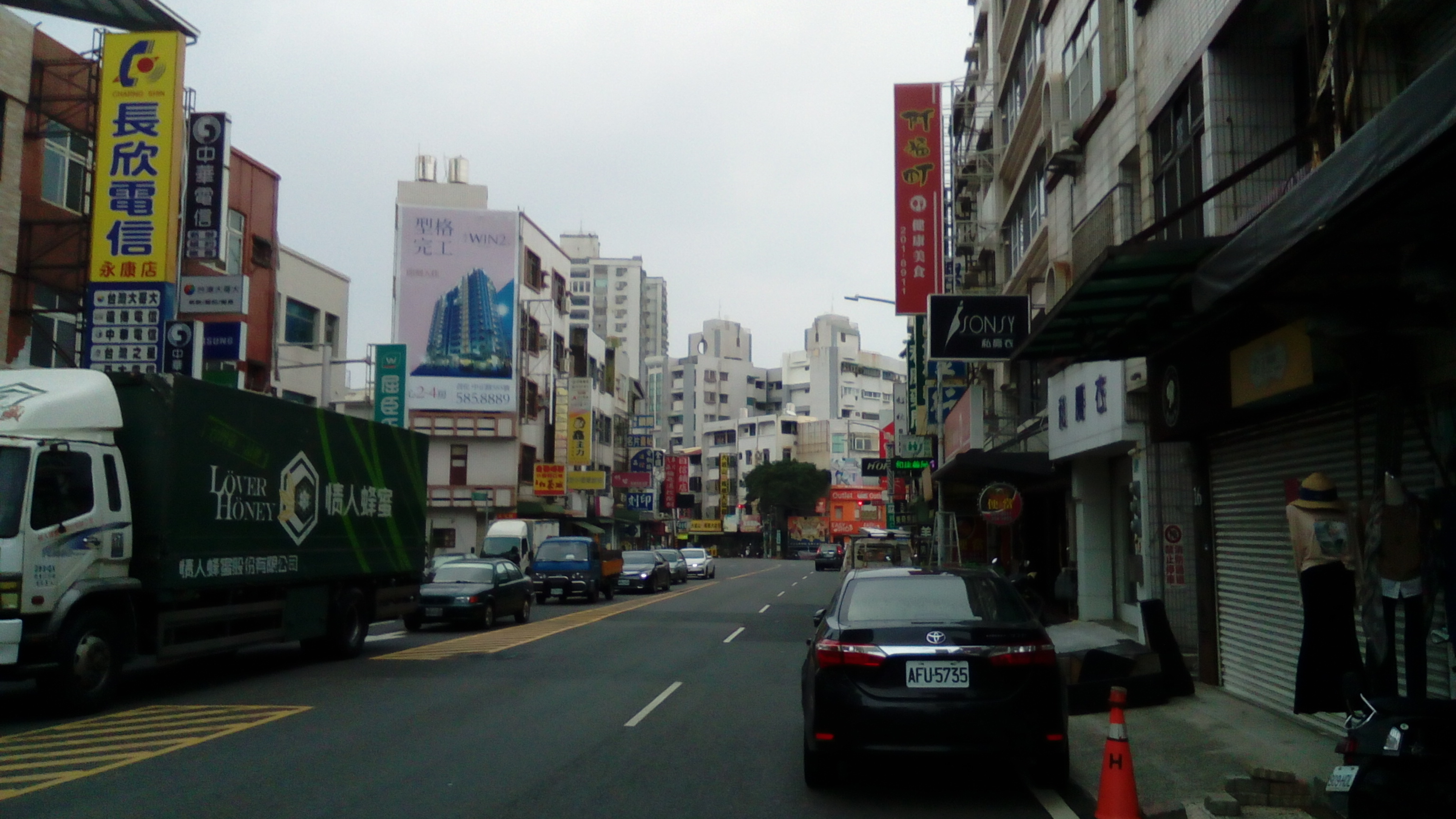 攝於台20線 中山北路 區公所旁